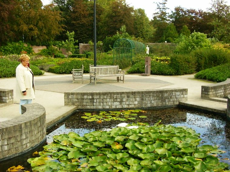 Geuren- en kleurentuin te Bokrijk - eigen foto